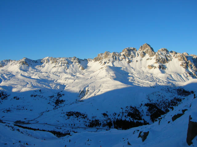 from my digital camera